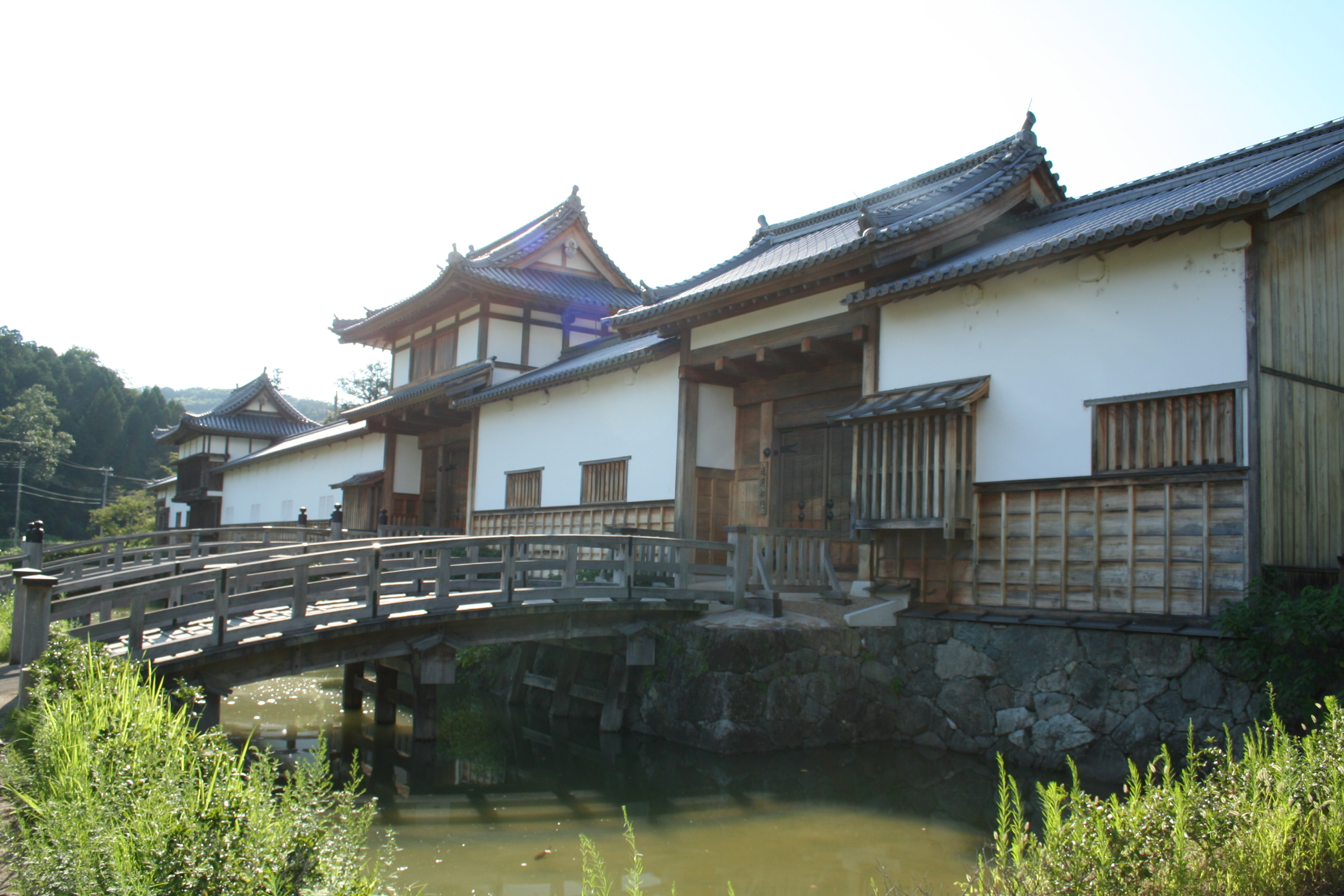 三日月陣屋。兵庫県佐用町三日月にある陣屋。 復元された建物と水掘。手前の出入り口は通用御門。